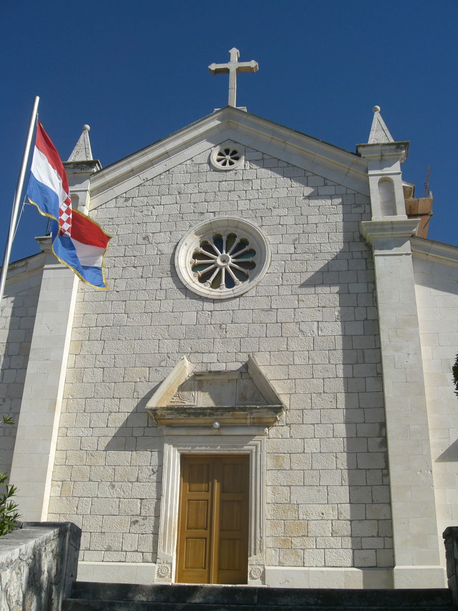 Crkva u Rogoznici, prednja fasada